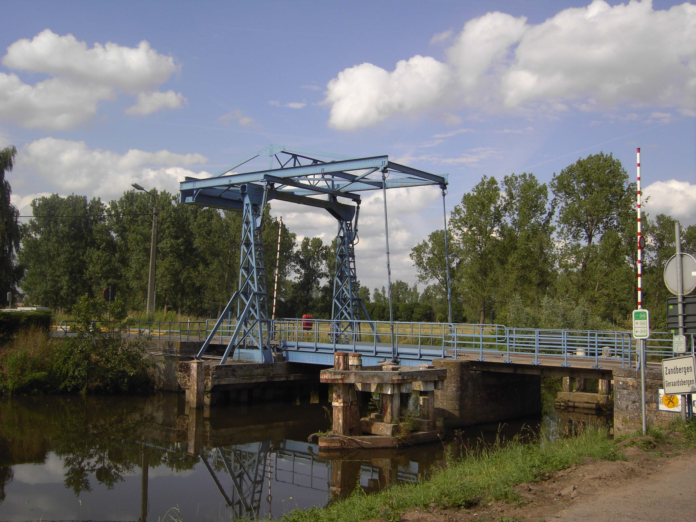 Zandbergen - Brug Dender